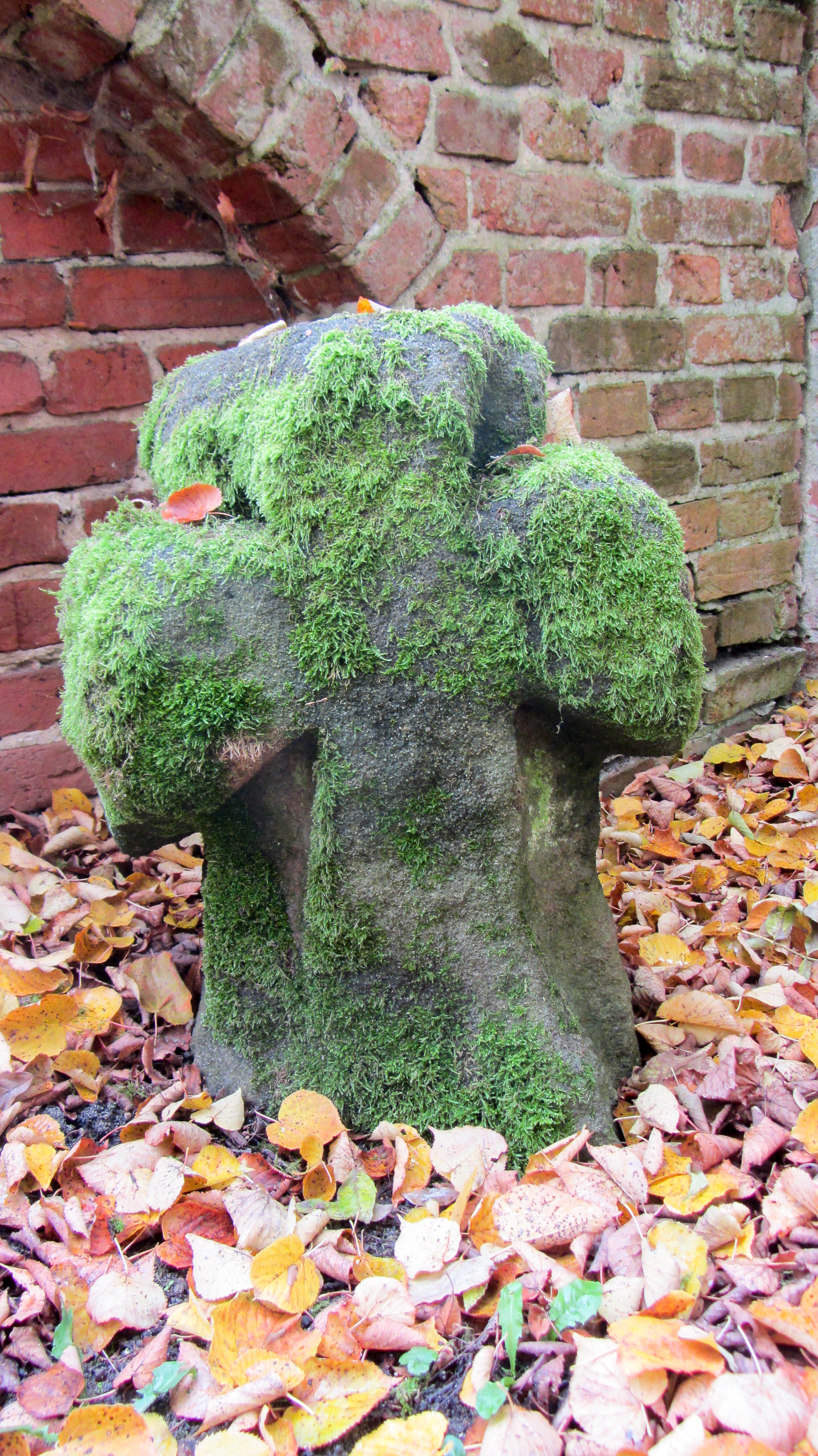 Steinkreuz II auf dem Kirchhof in Berge OT von Hansestadt Werben (Elbe) Bodendenkmal in: Werben (Elbe)